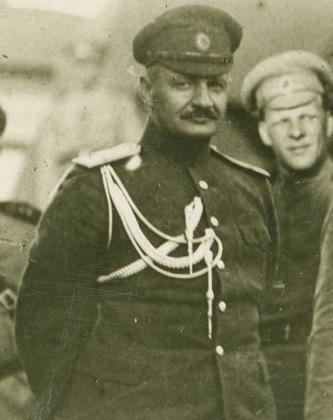 генерал-лейтенант Иван Павлович Романовский